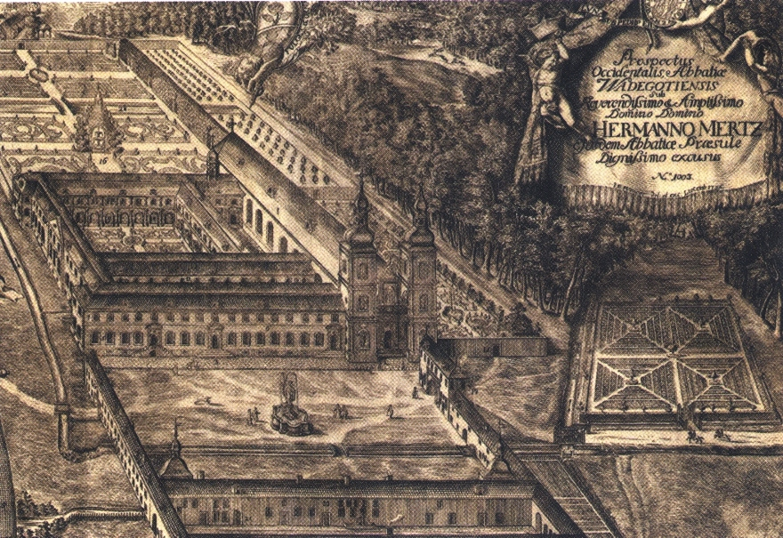 Abtei Wadgassen